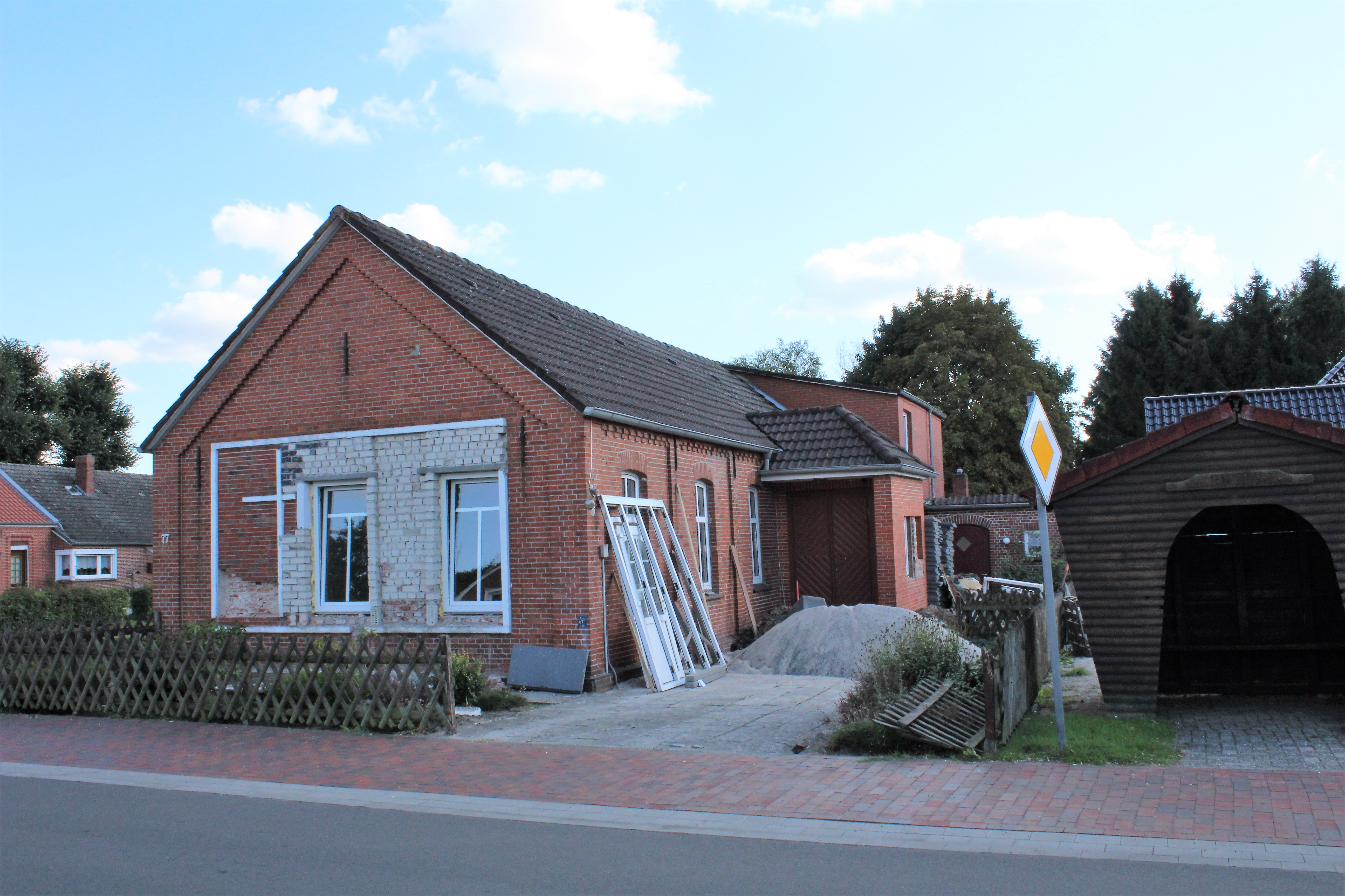 Ehemalige Friedenskapelle Wymeer, Landkreis Leer, Niedersachsen, Deutschland